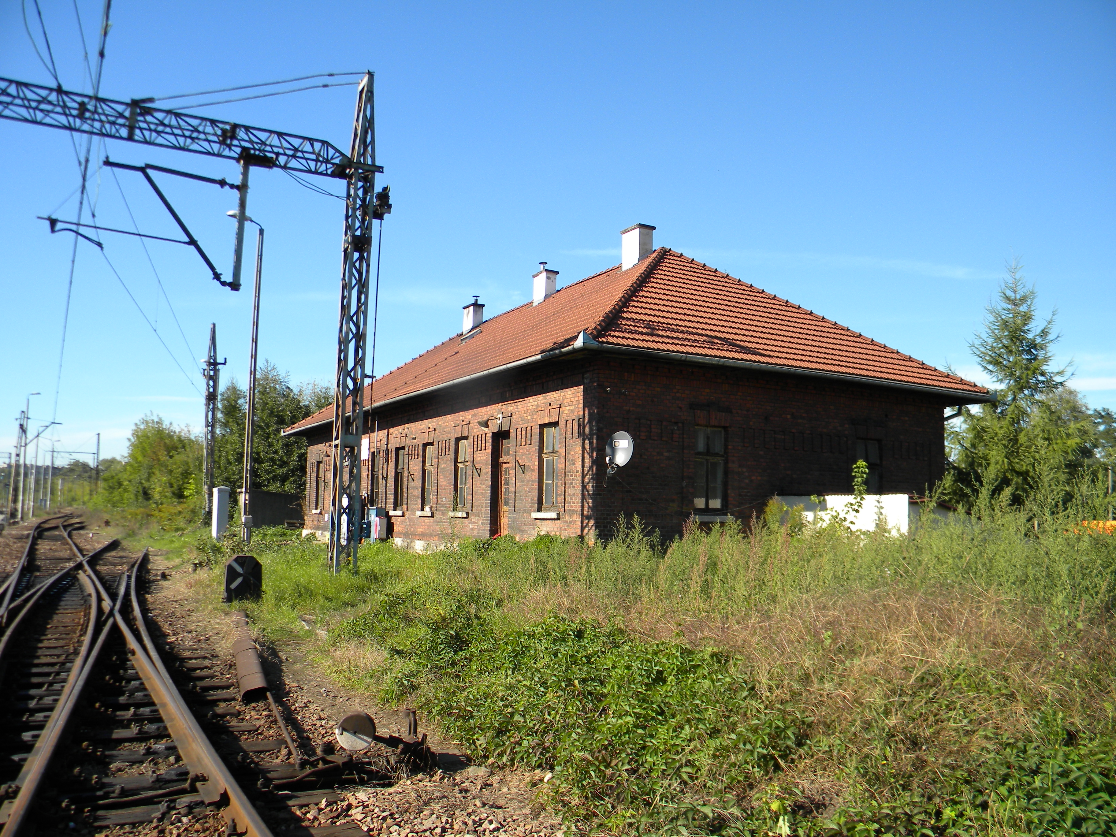 Dawny dworzec